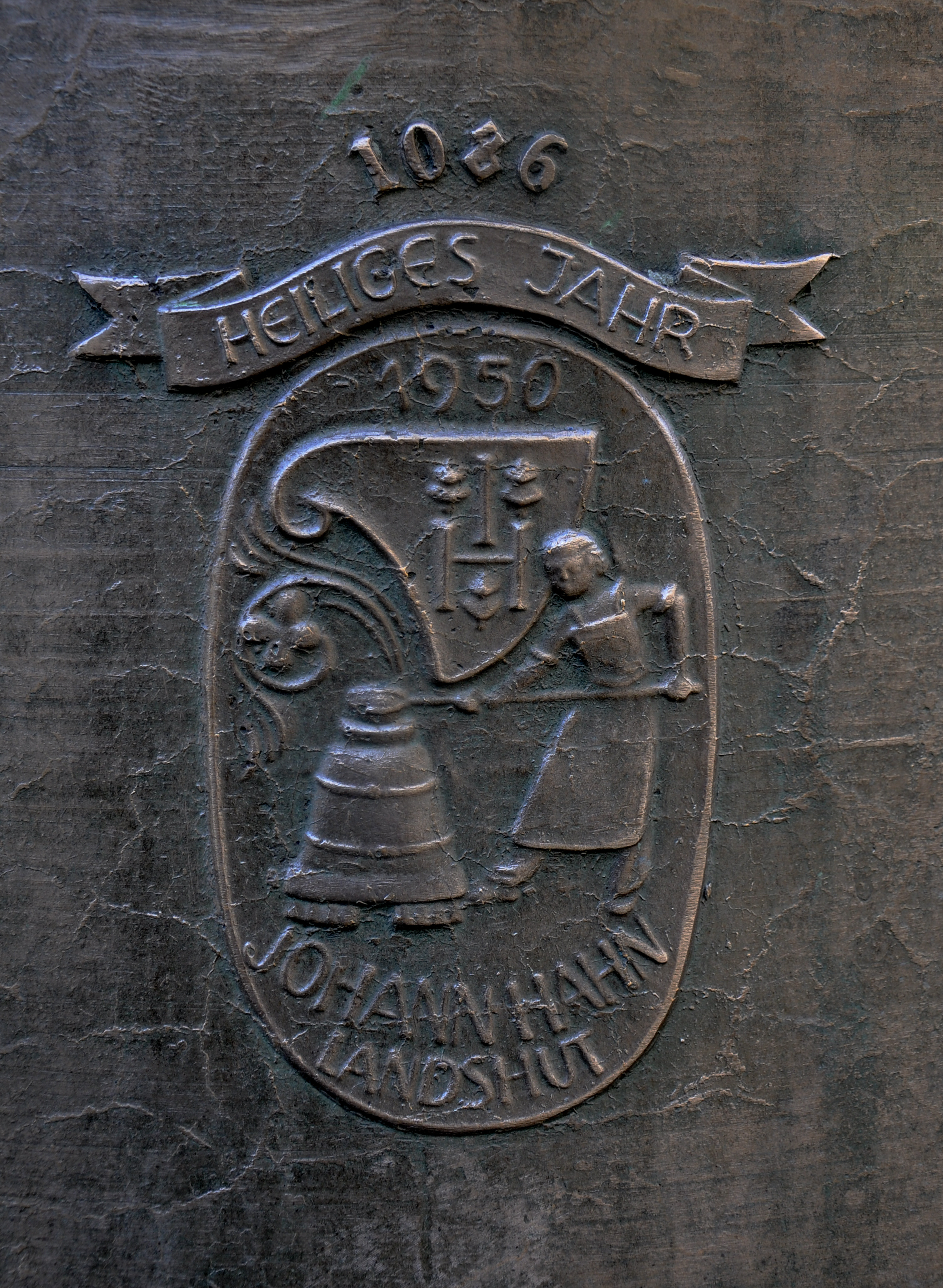 Wangen im Allgäu, Kath. Pfarrkirche St. Martinus Marienglocke vor der Kirche, Zeichen auf der Rückseite